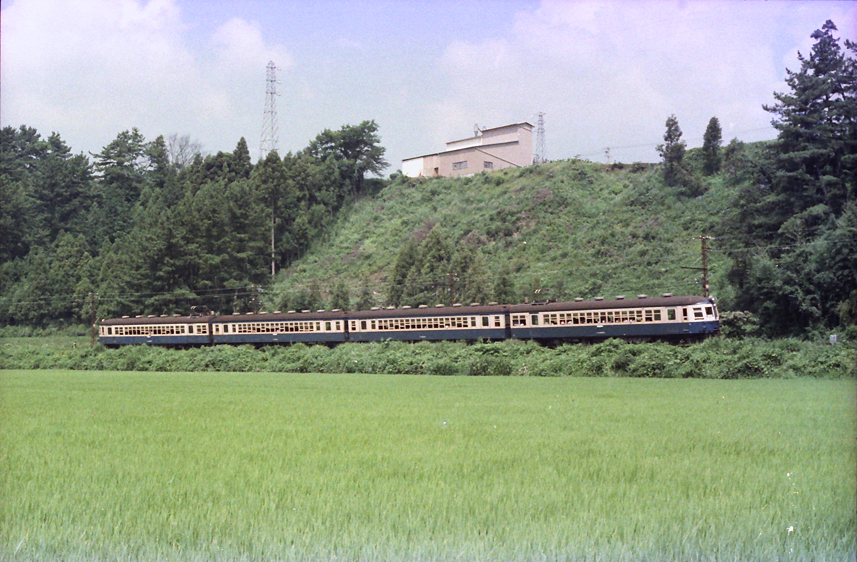 飯田線 東上駅-野田城駅 愛知県新城市